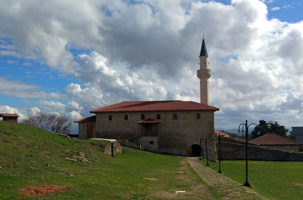 Prezë Castle